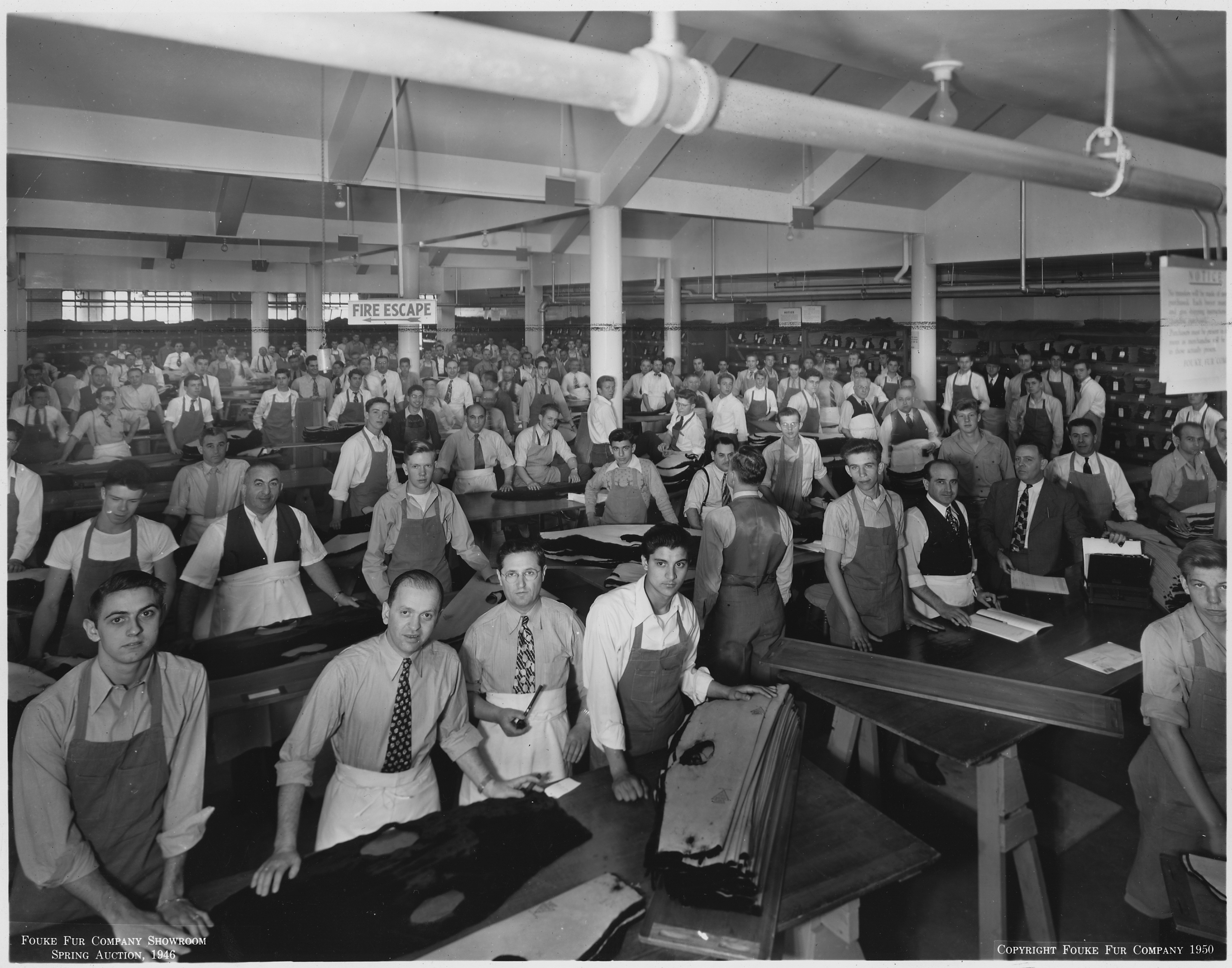 (seal skins)